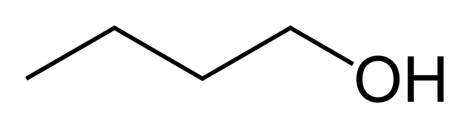 1-Butanol, Butan-1-ol